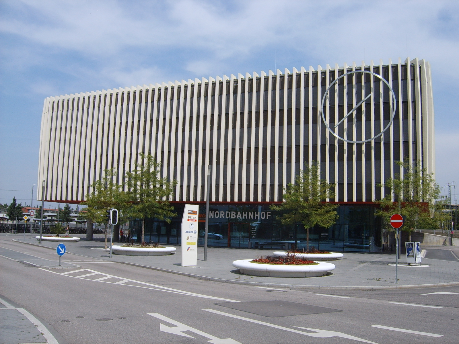 Das Bild zeigt das neue Empfangsgebäude des Bahnhofes Ingolstadt Nord